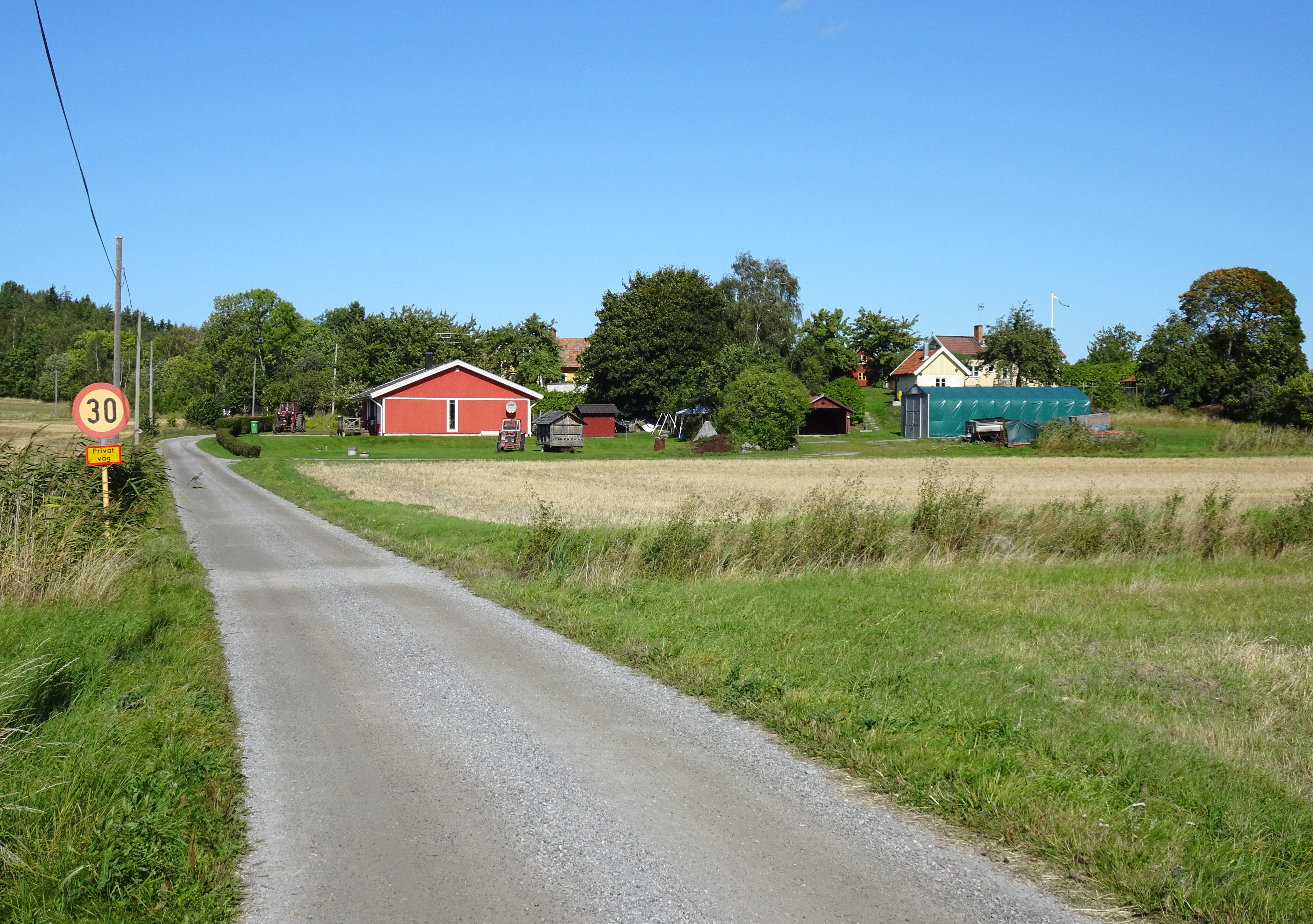 Byväg till Lundkulla, Adelsö